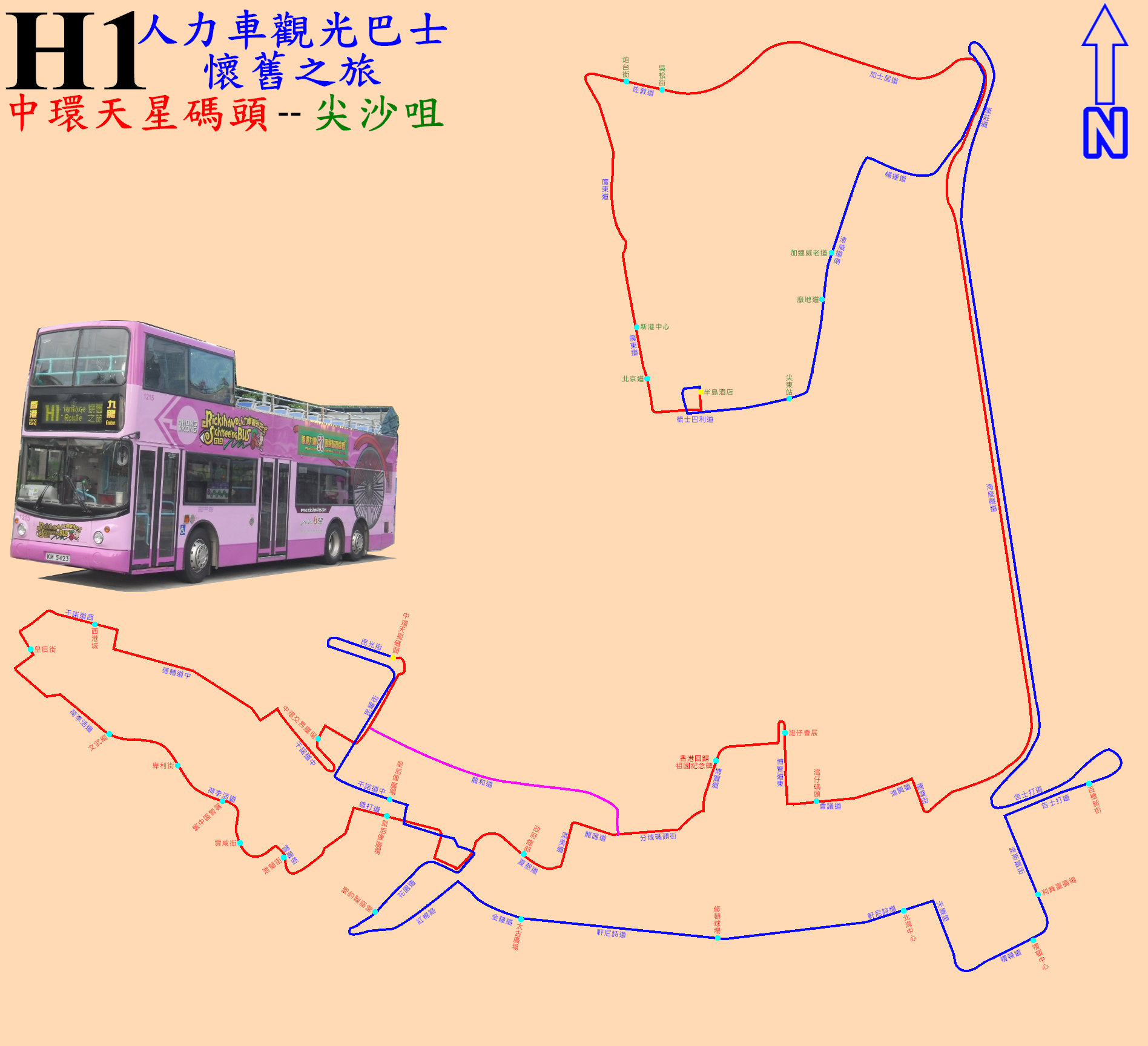 中文（香港）: 新巴人力車觀光巴士H1線的走線圖